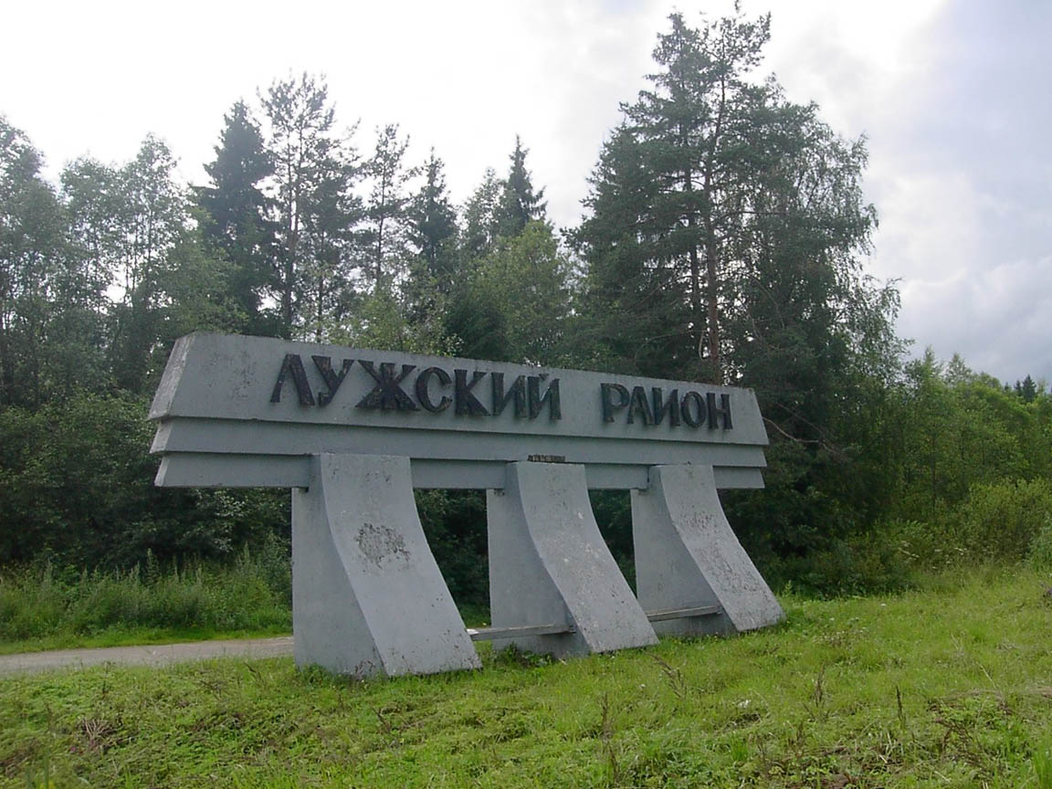 Граница Лужского района Ленинградской области